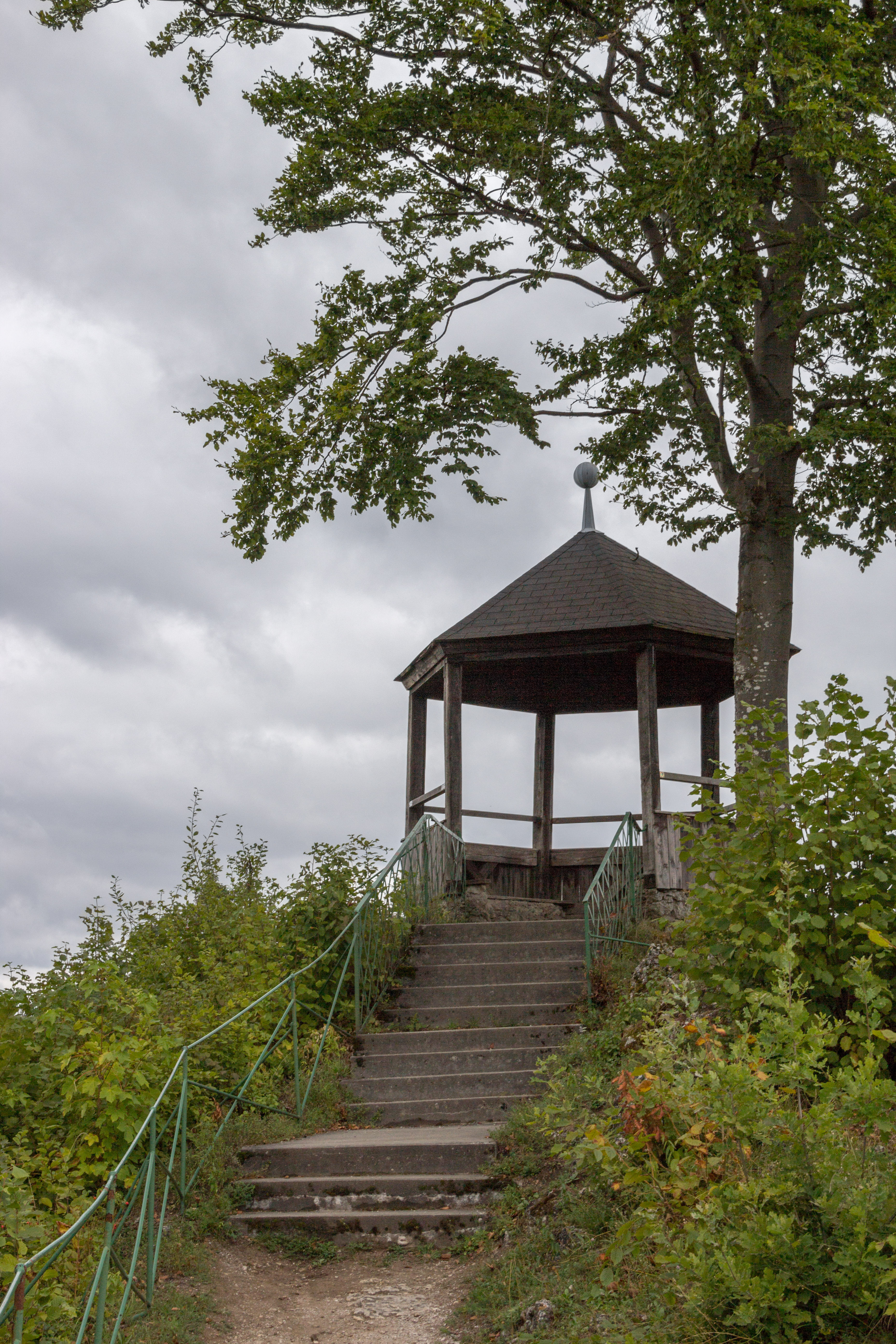 Wagnershöhe, Gößweinstein